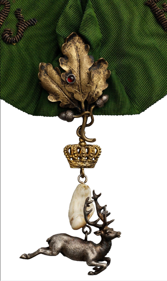 Благородный Орден Белого Оленя Святого Губерта